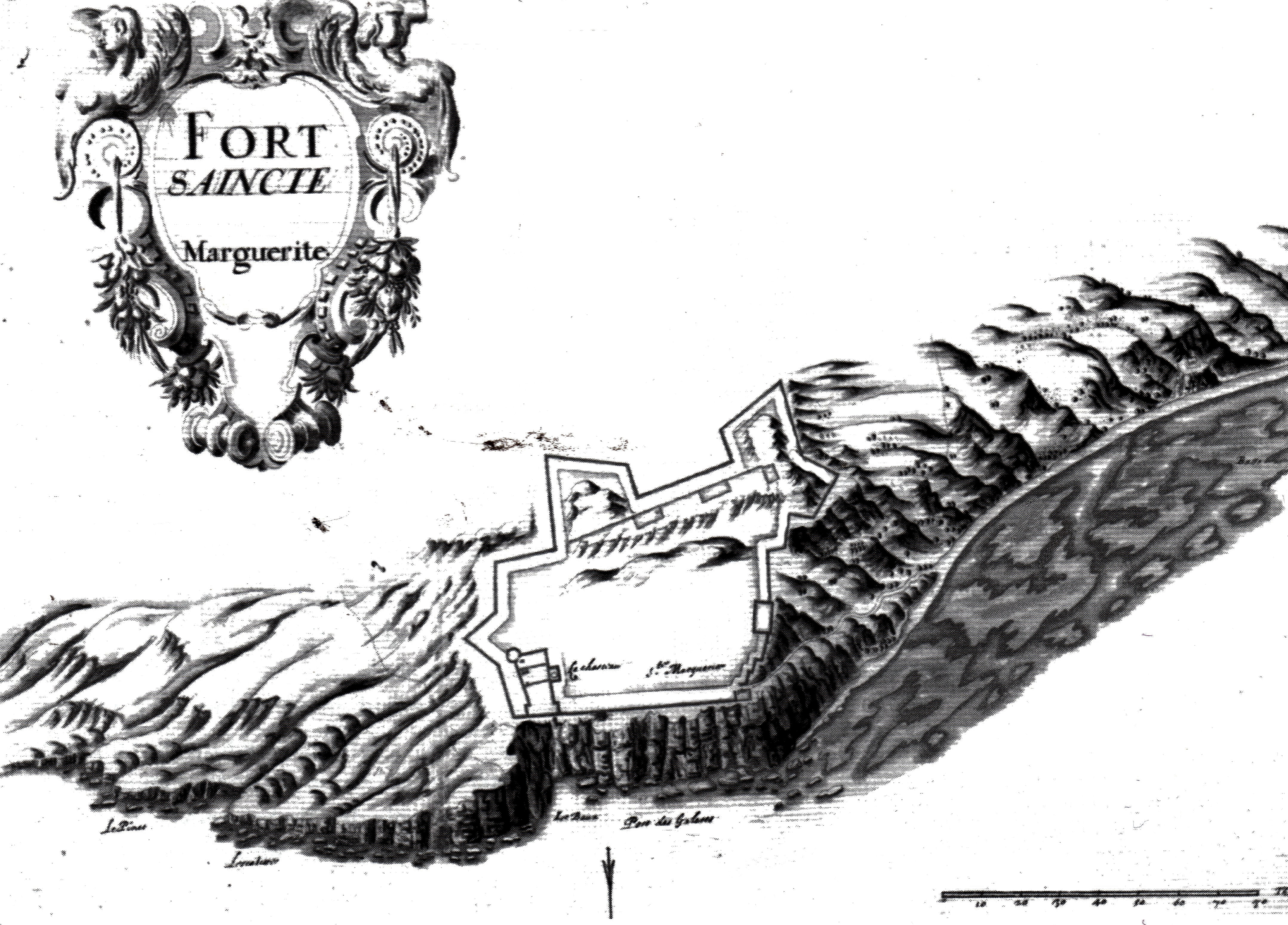 Fort Saincte Marguerite - Plan réalisé en 1634 par Jacques de Maretz